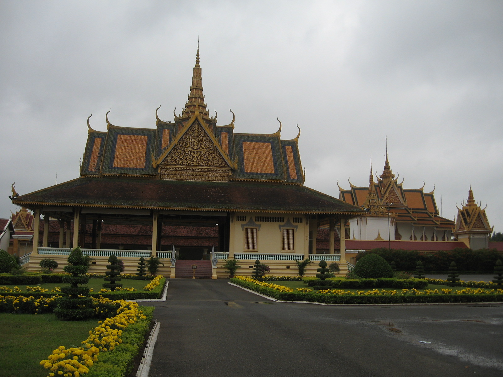 Điện Phochani- ảnh Phan Minh Châu - tài khoản liftold trên wiki chụp tại Hoàng Cung